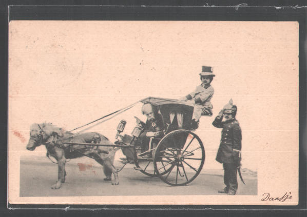 Kleinwüchsige mit Pseudopferdekutsche mit vorgespanntem Hund